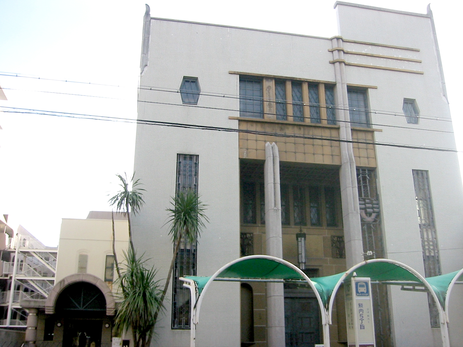 神戸市文書館(旧・池長美術館)設計:小川安一郎